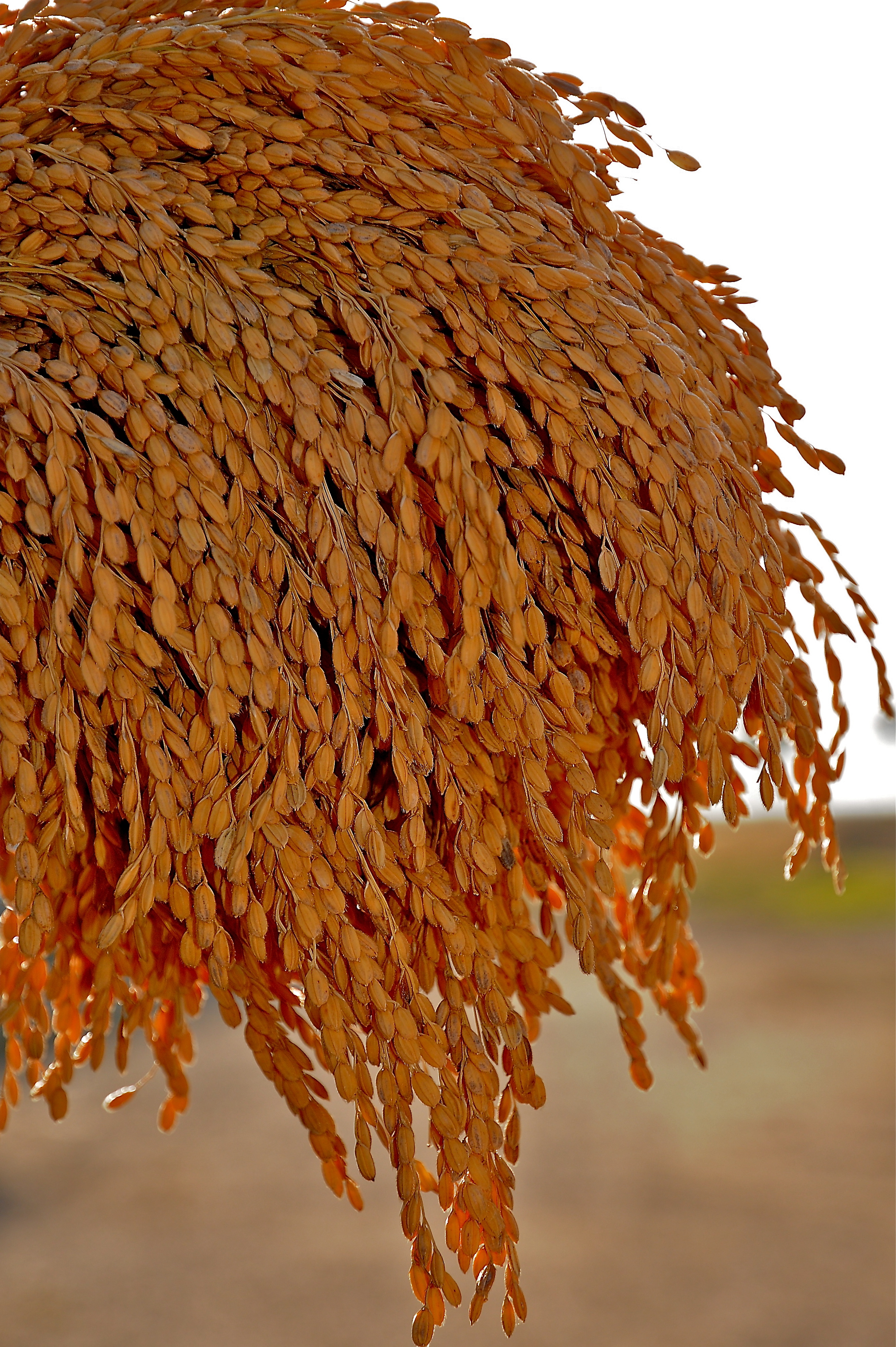 fotografia di una pannocchia di riso varieta' Maratelli